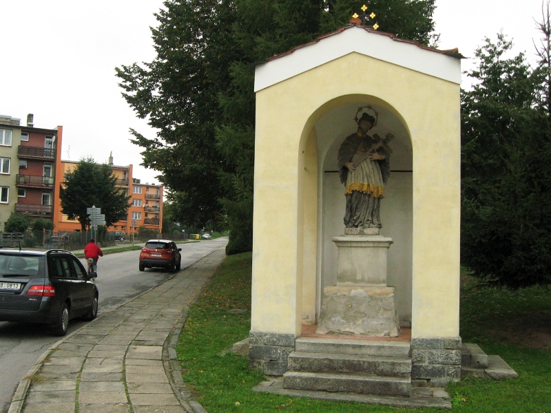 Socha svatého Jana Nepomuckého, Kamenice nad Lipou.